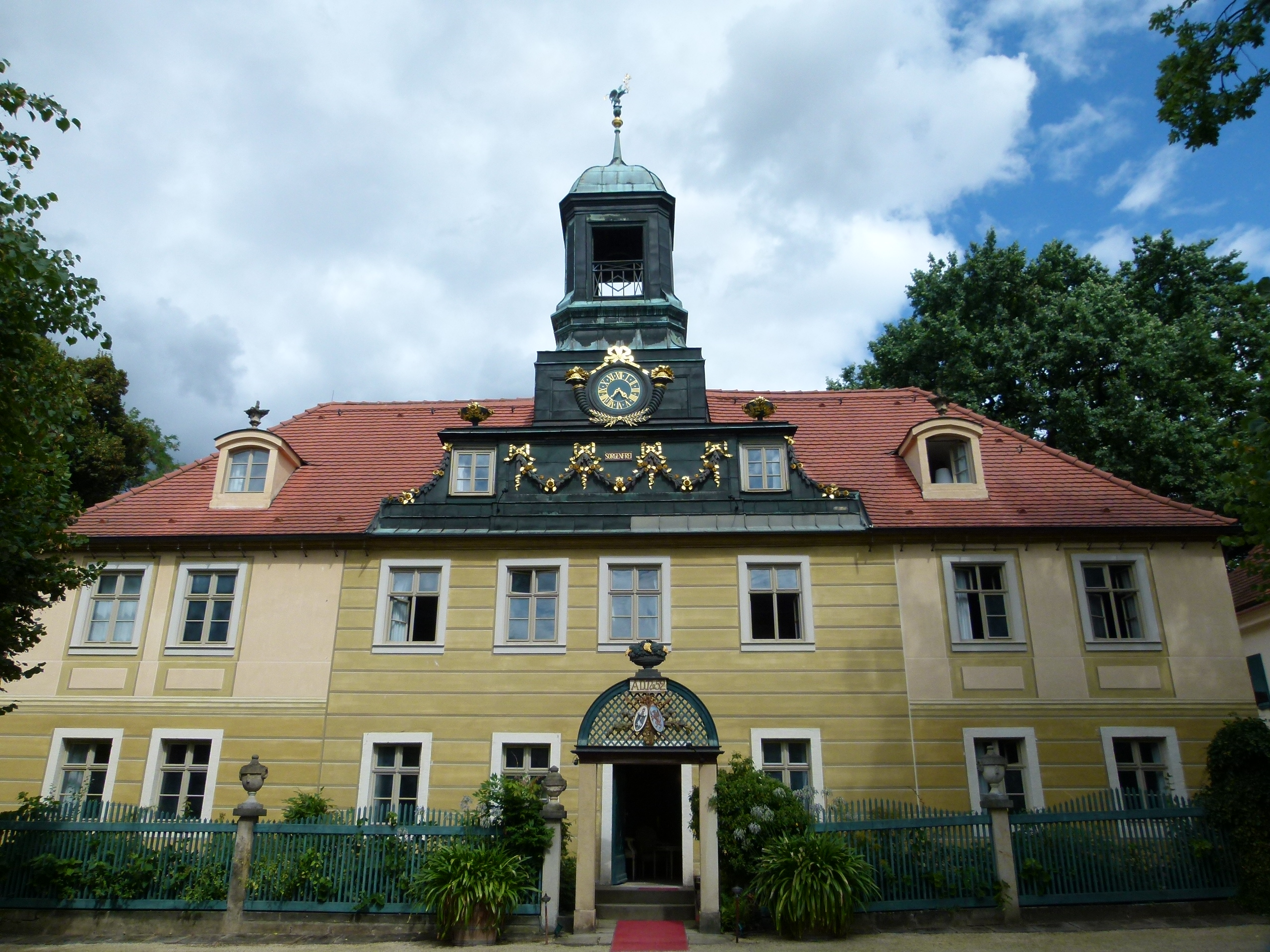 Denkmalgeschütztes Gebäude, Augustusweg 48, Radebeul, Sachsen